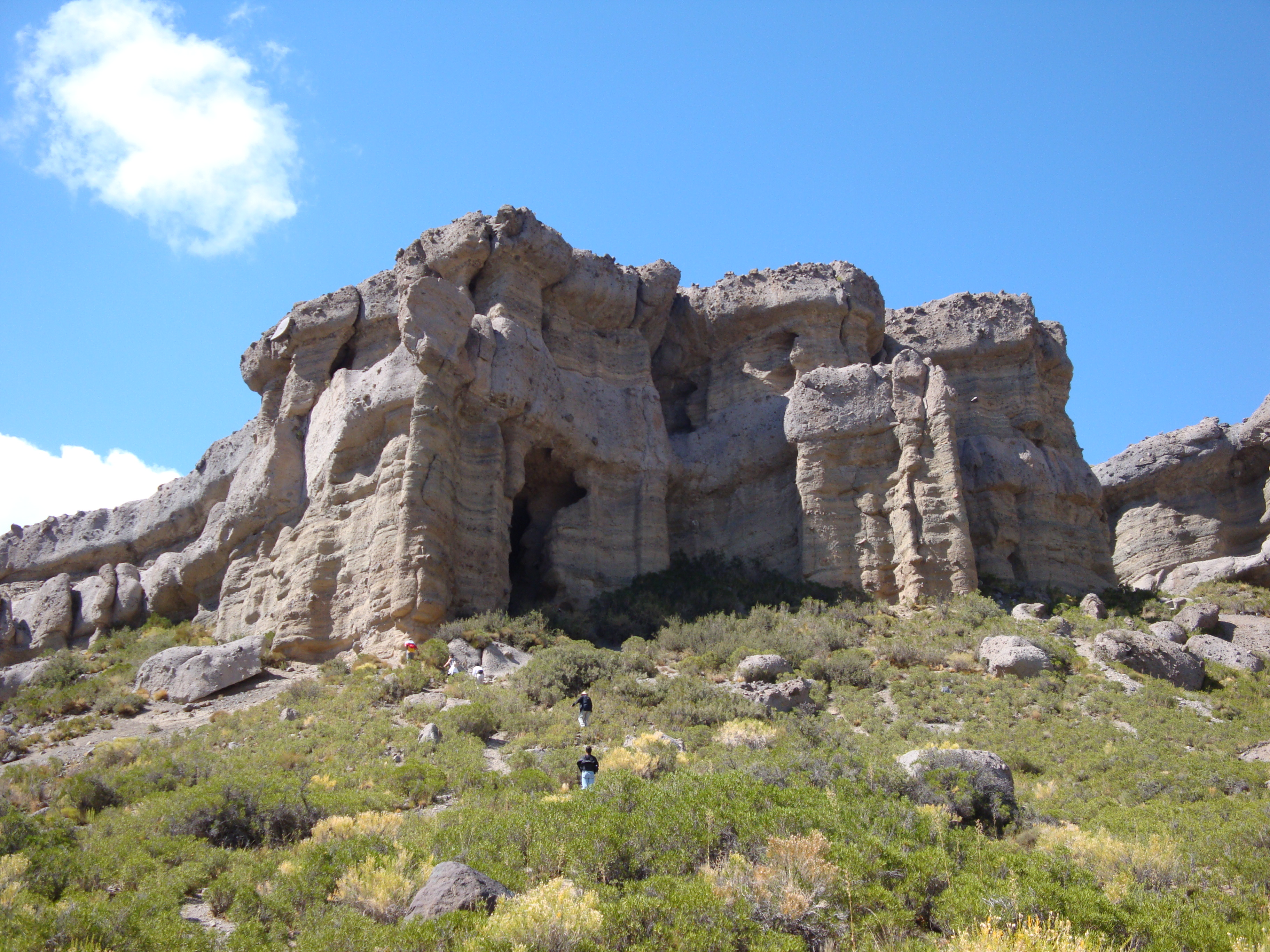 Castillos de Pincheira en Malargüe, provincia de Mendoza, Argentina.